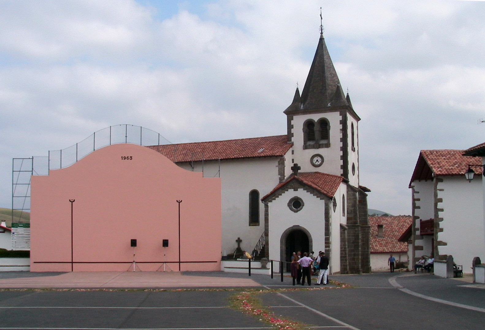 La place d'Armendaritz pendant la fête Dieu 2006.